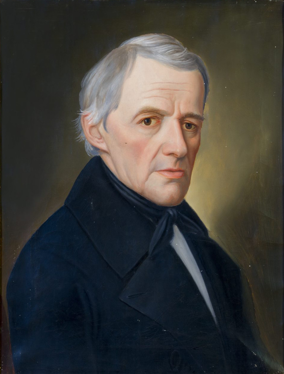 Selbstporträt von Franz Sales Lochbihler als gealterter Mann